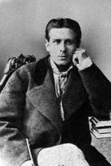 Тодор Каблешков